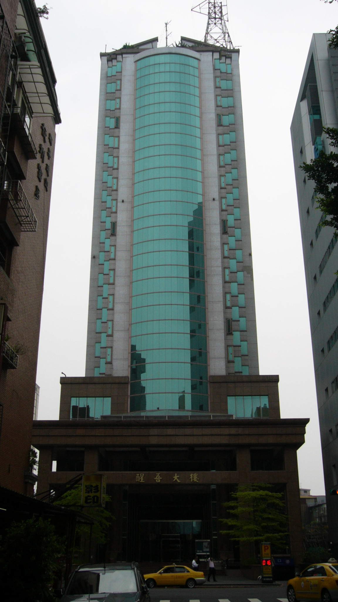 醒吾大樓，位於臺北市中正區杭州南路一段15之1號，是台北之音總部、超級電視台第一代總部與財團法人廣播電視事業發展基金末代總部所在地。此為醒吾大樓正面外觀，頂樓架設發射天線及發射機。